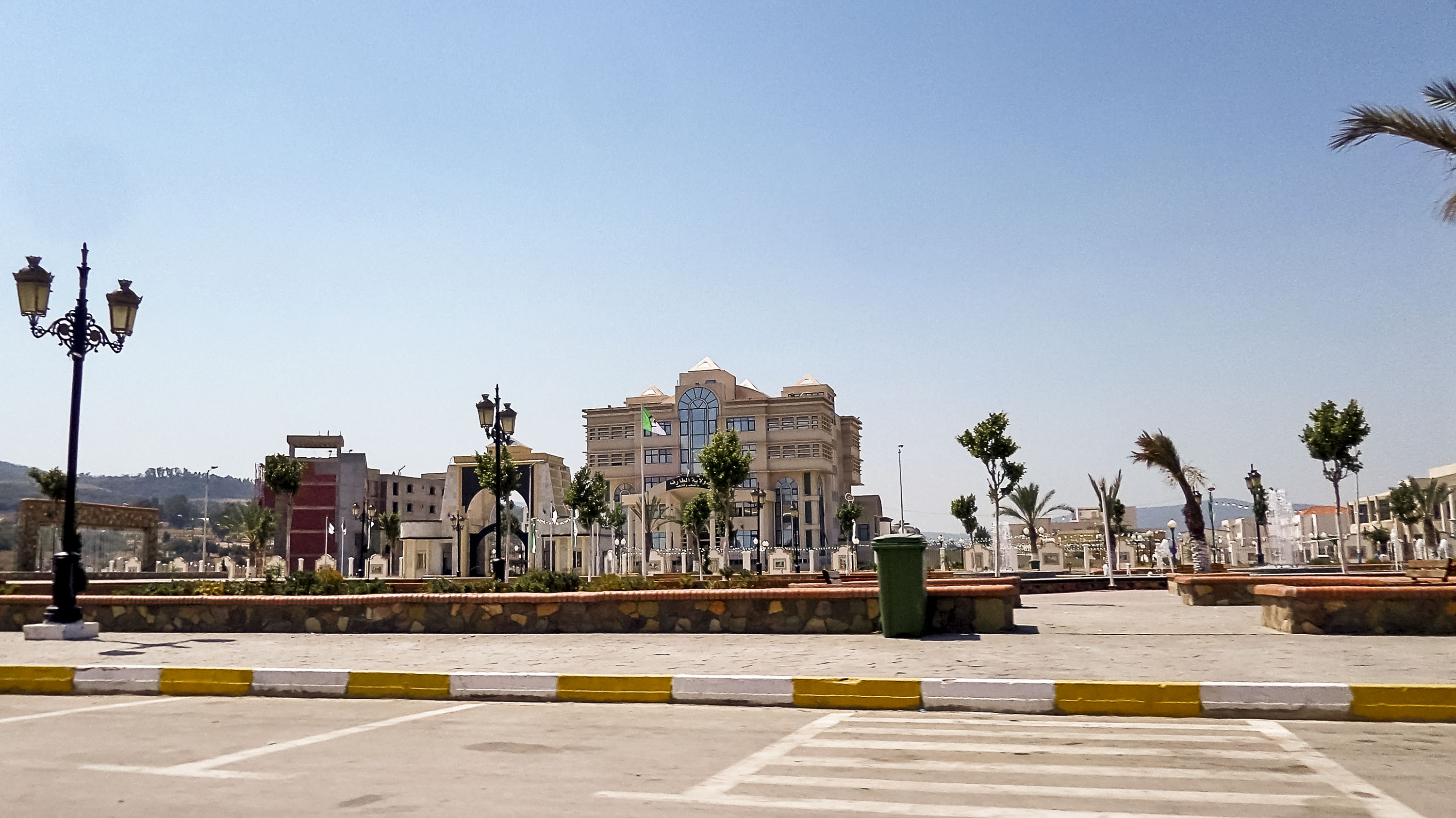 El Tarf, siège de la wilaya مقر ولاية الطارف